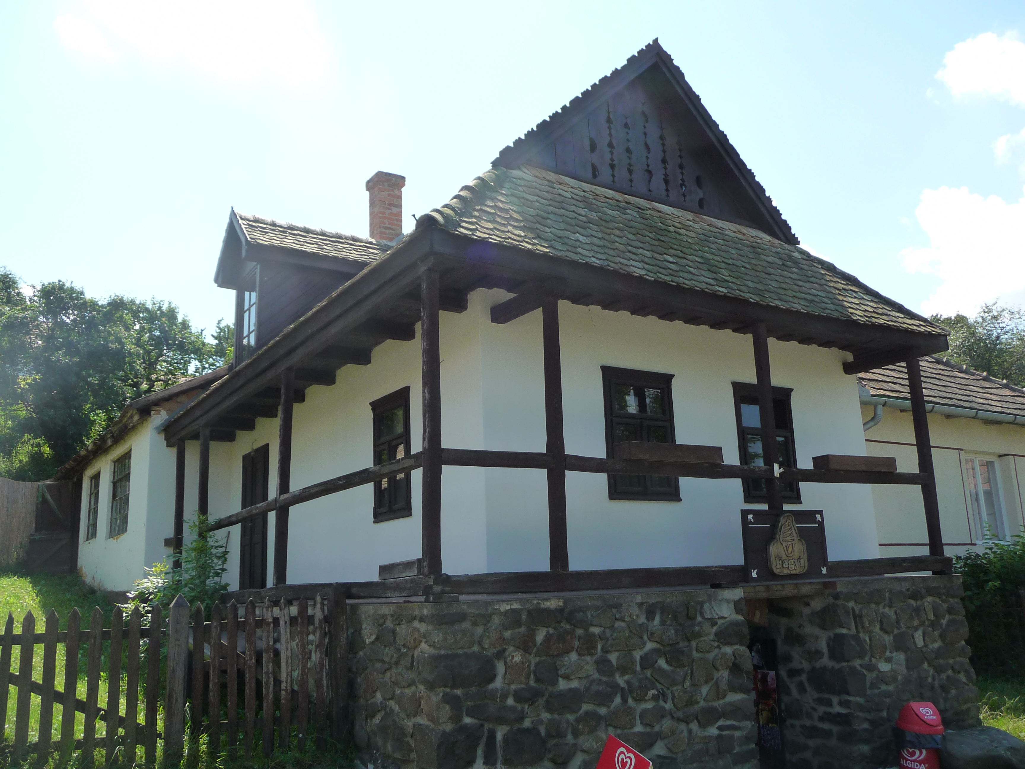 Hollókő, Kossuth L. út 58.(?)